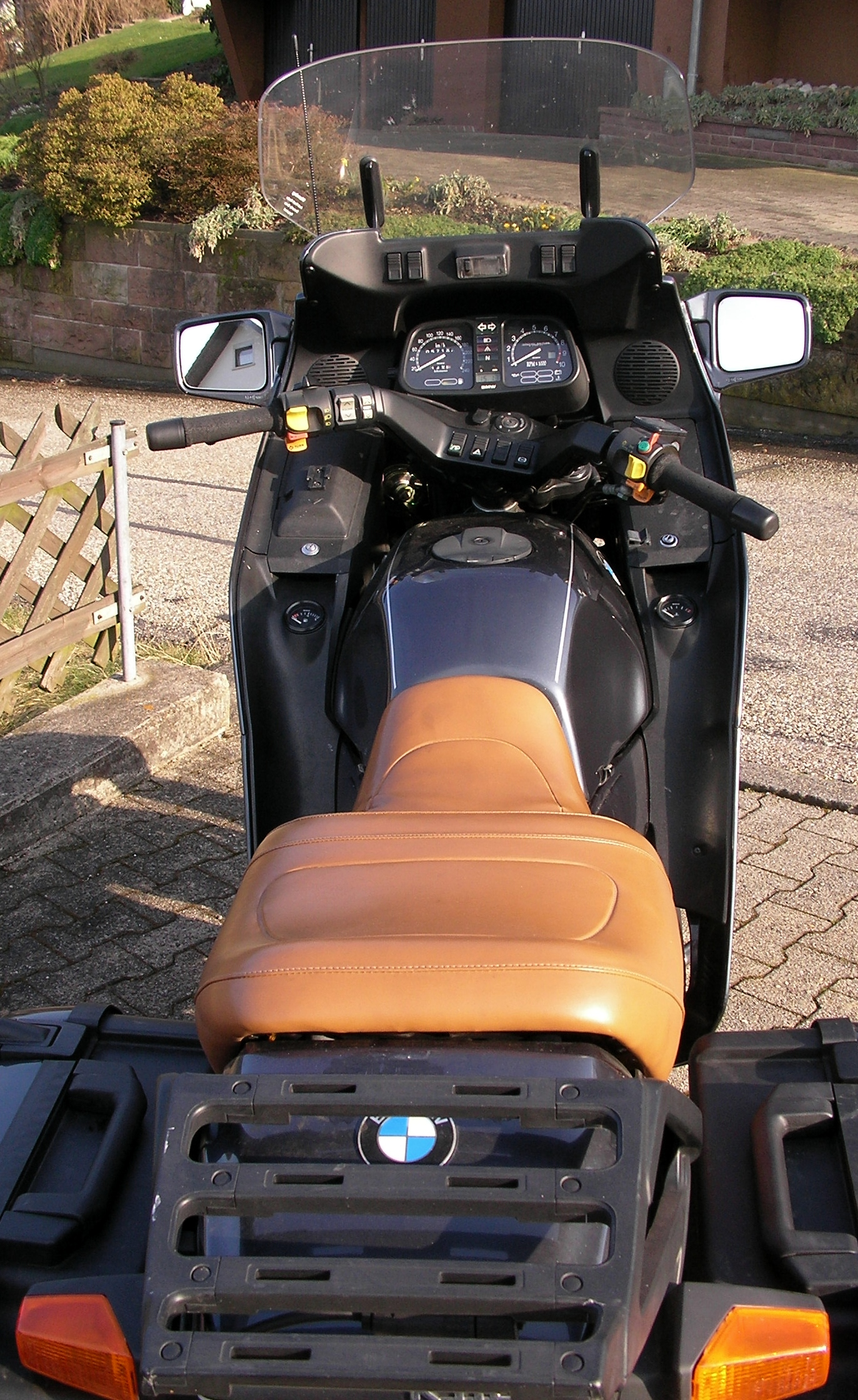 BMW K 1100 LT SE, Bj. 1994